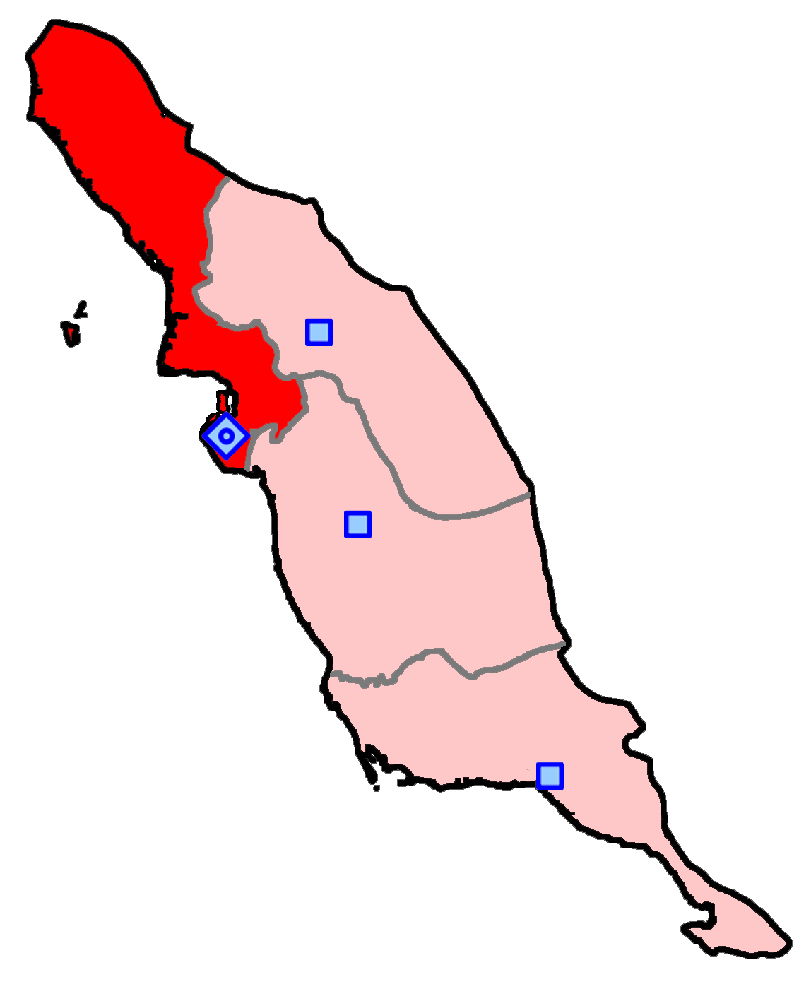 حوزهٔ انتخاباتی بوشهر و گناوه و دیلم برای انتخابات مجلس شورای اسلامی